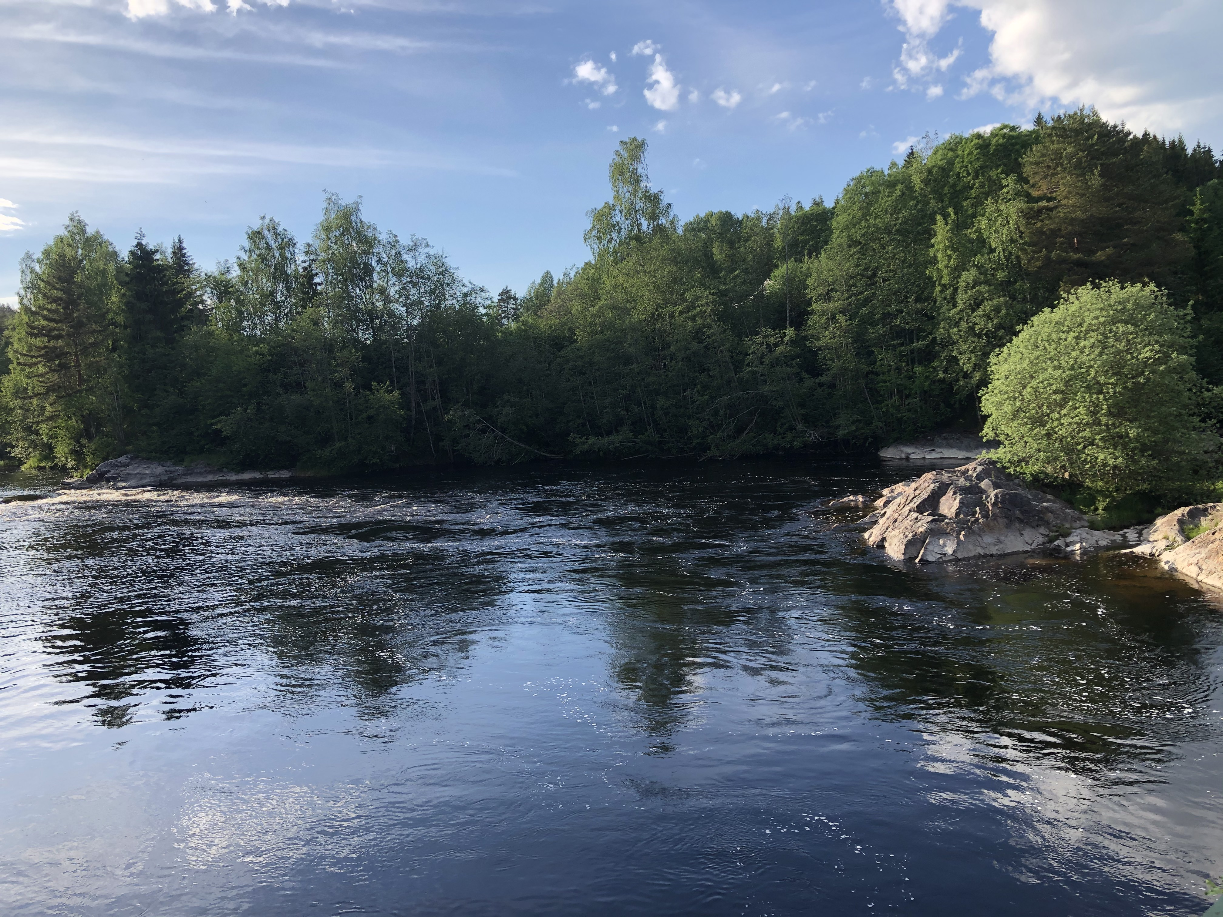 Badeplass i elven Sogna ved Heiern, Ringerike